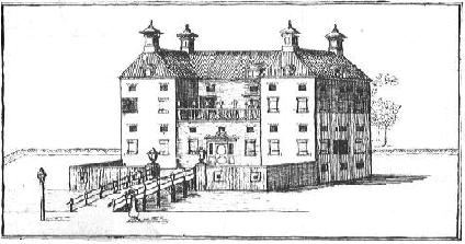 Nittersum, borg bij Stedum in de provincie Groningen. In de veertiende eeuw gebouwd. In 1818 gesloopt.